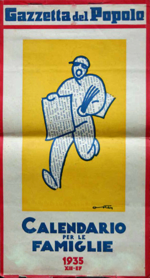 Couverture du calendrier édité par la Gazzetta del Popolo en 1935.